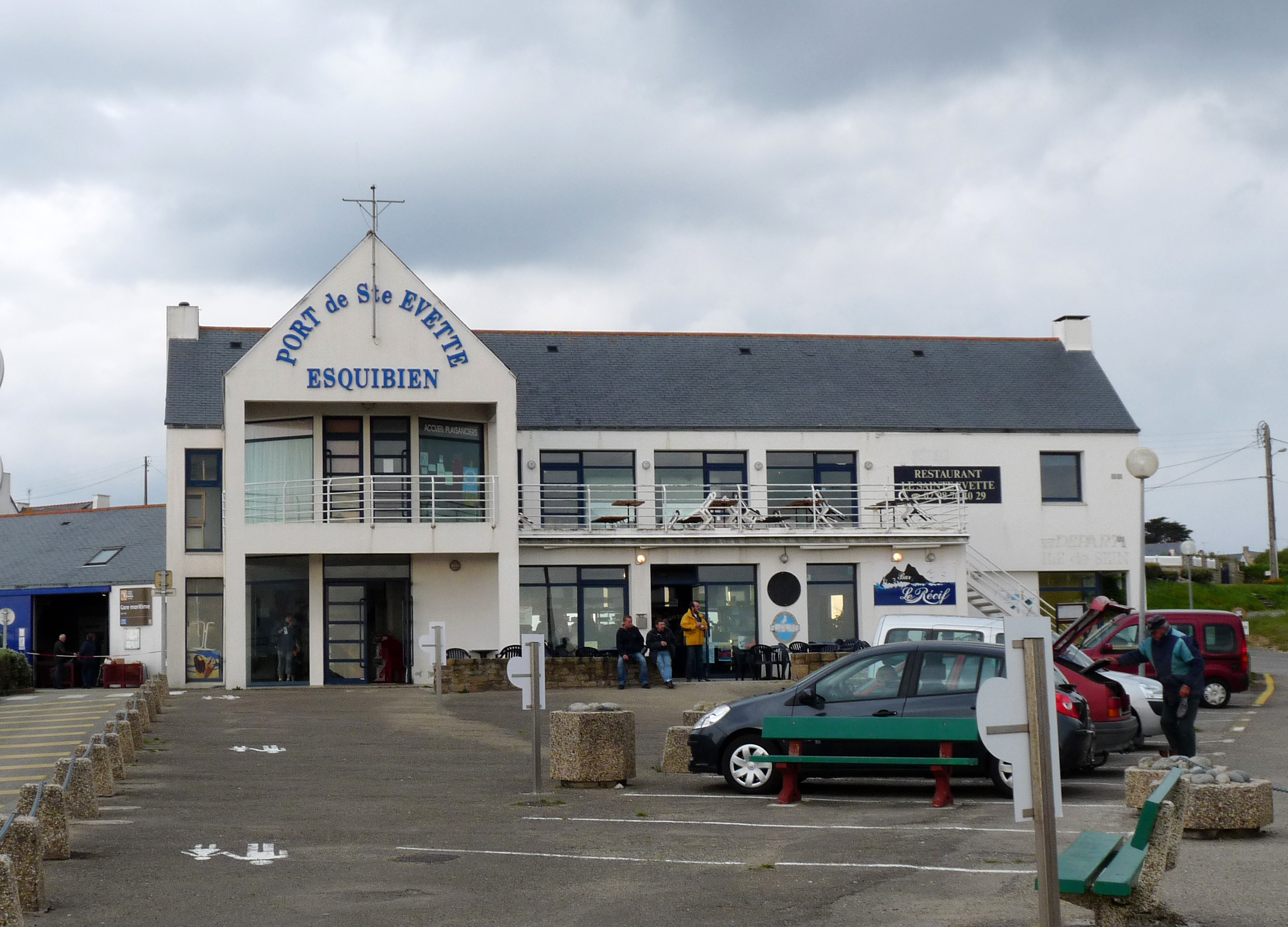 Le port de Sainte-Evette à Esquibien (Finistère). Embarcadère pour l'île de Sein)